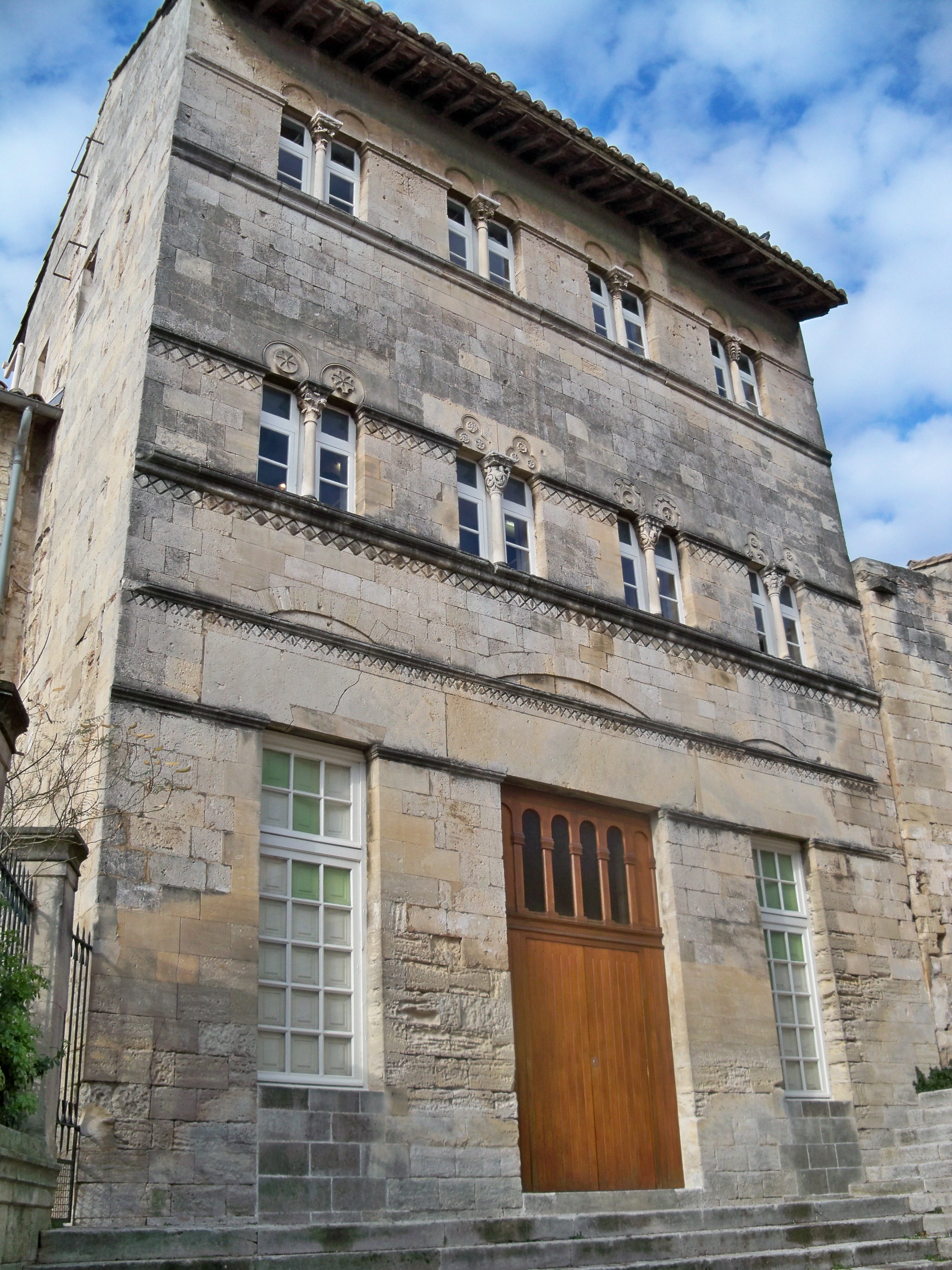 Maison romane à Sain Gilles (30)